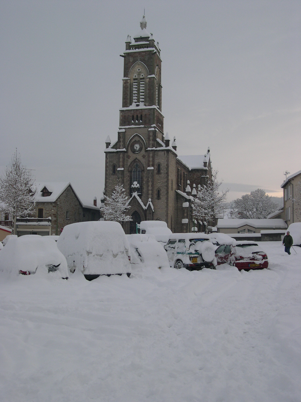 Capdenac-Gare (Aveyron, Midi-Pyrénées, France) - La place du 14 juillet et l'église Notre-Dame-des-Voyageurs sous la neige.